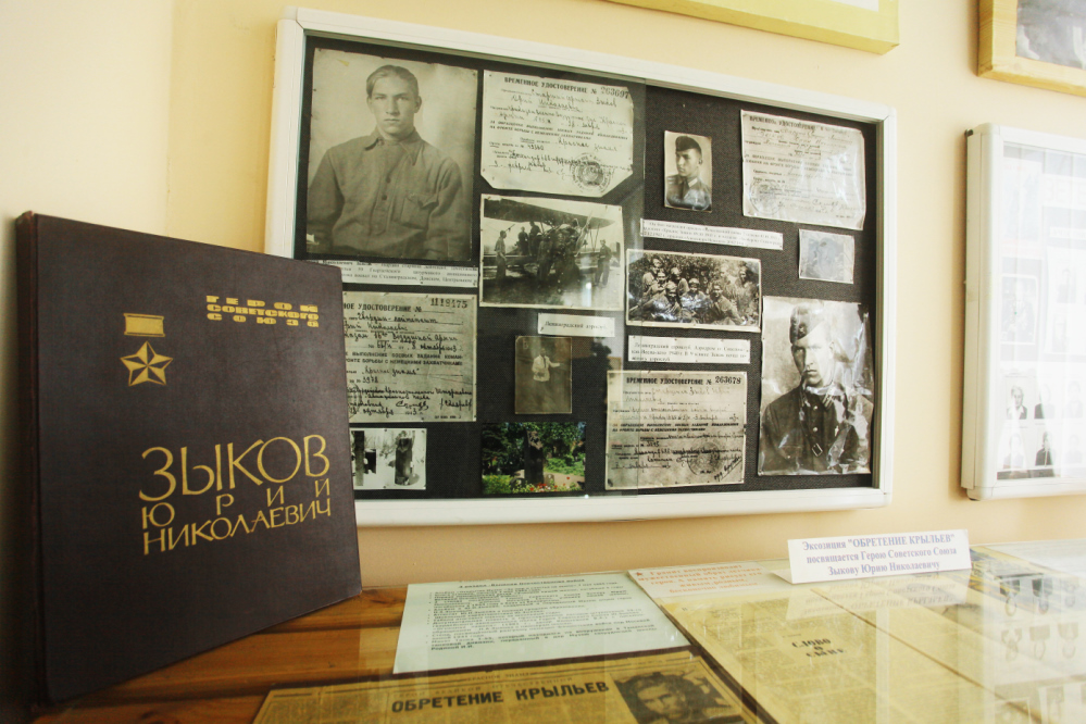 Стенд Ю.Н. Зыкова